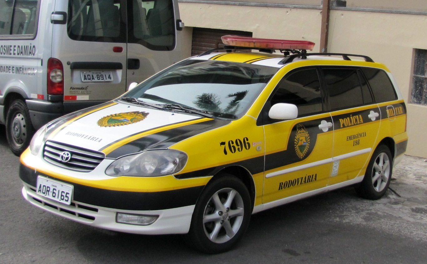 Viatura do Batalhão de Polícia Rodoviária da Polícia Militar do Paraná.